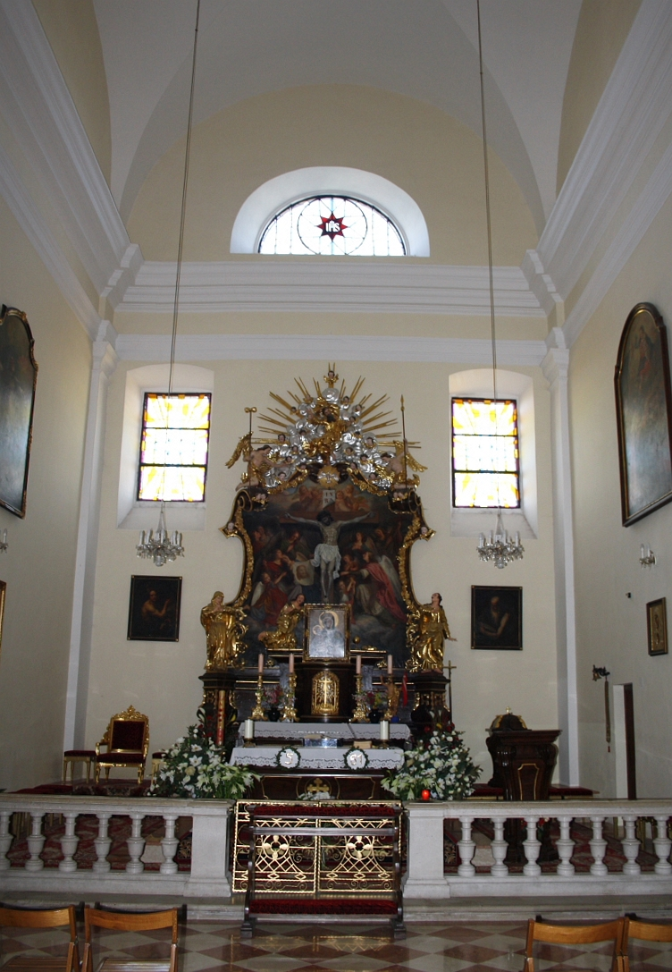 Innenansicht Richtung Hochaltar der St. Josefskirche (Kahlenberg) in Wien.